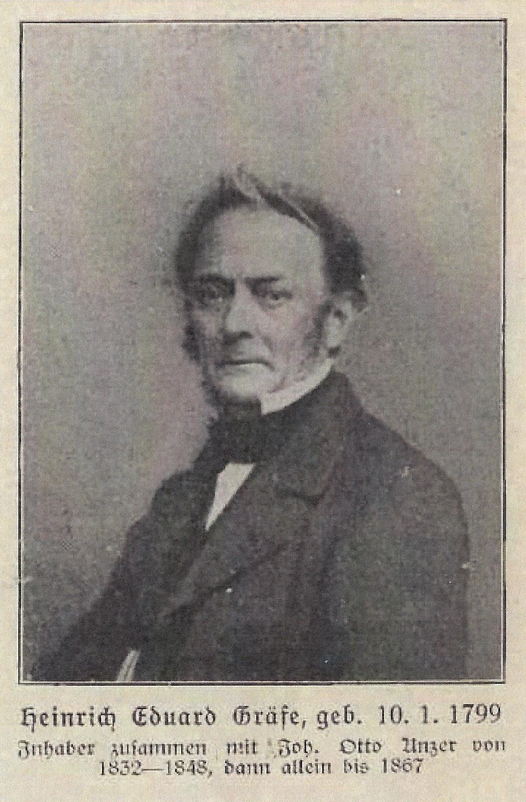 Fotografie von Eduard Gräfe